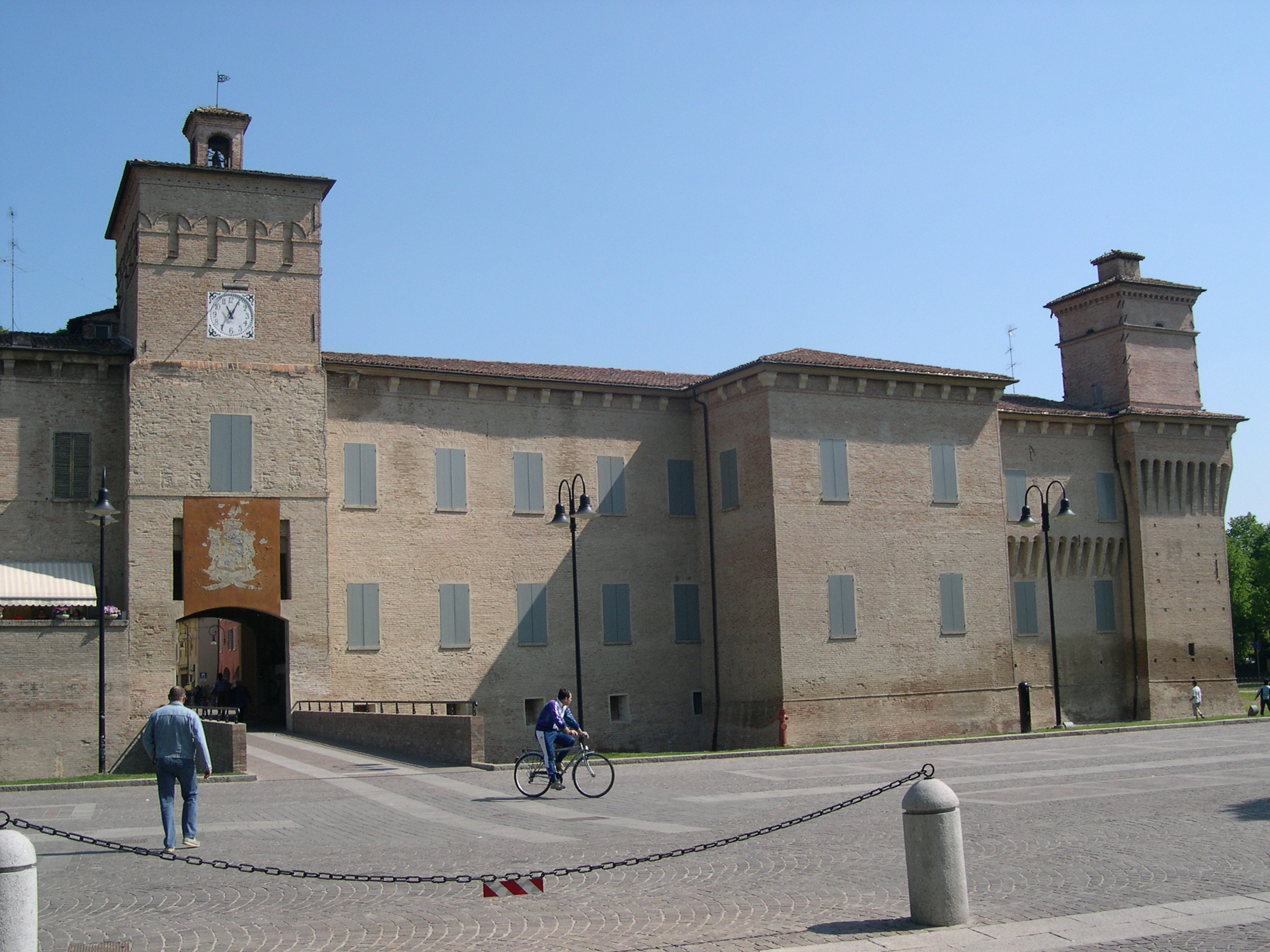 castello campori, Soliera (mo) italy